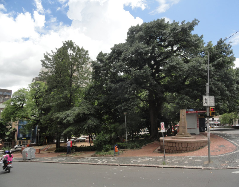 Template:Praça Dom Feliciano, em Porto Alegre, Brasil.